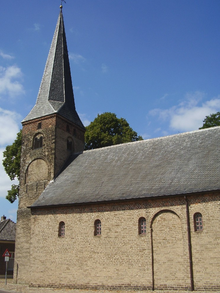 Kerk in Wilp, Nederland / the Netherlands